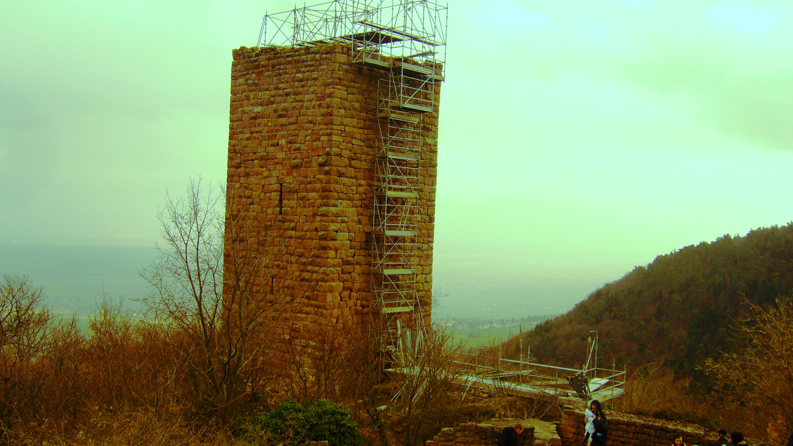 Le donjon du Weckmund en travaux